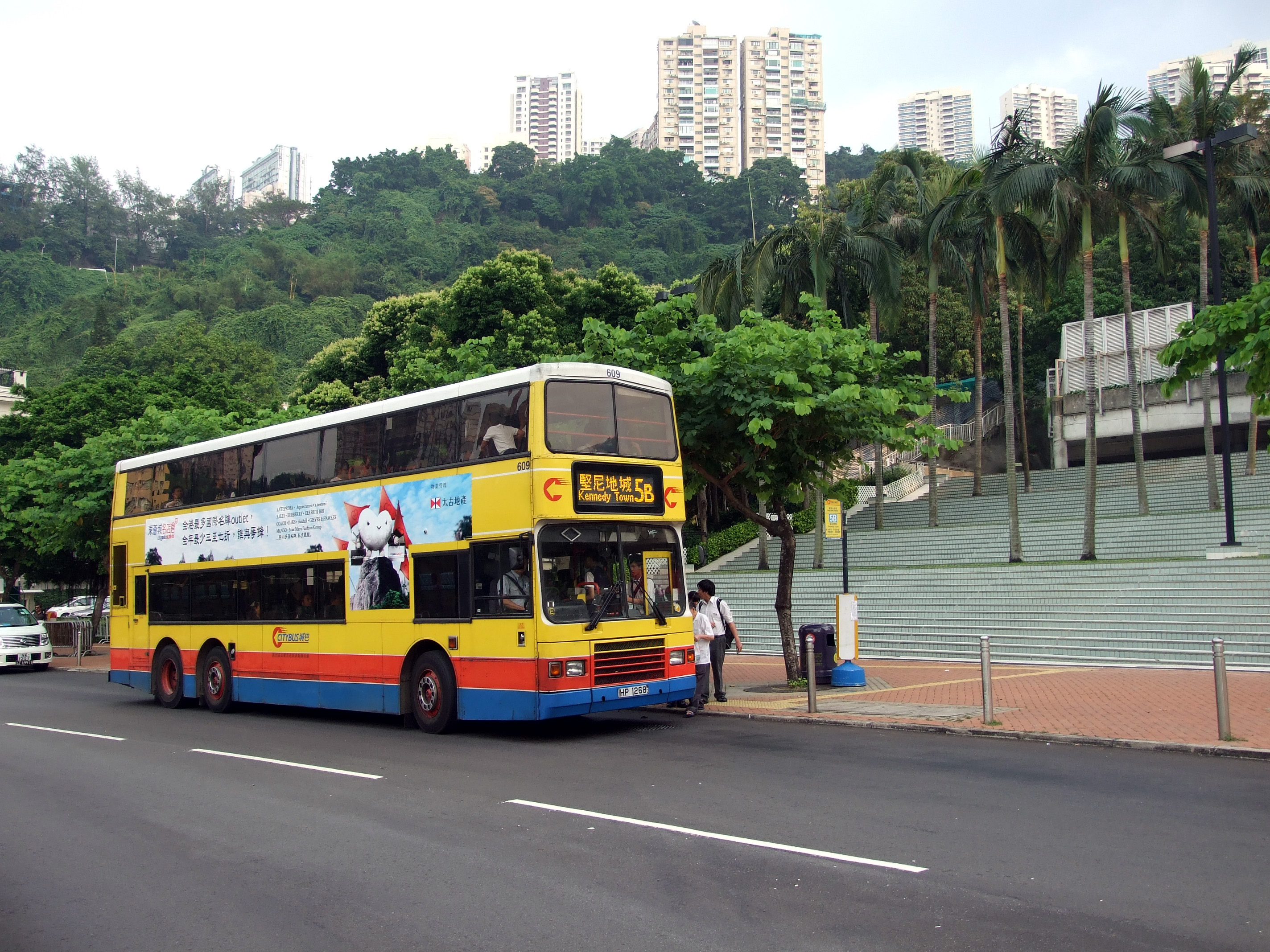 中文（香港）: 城巴5B線大球場正門總站